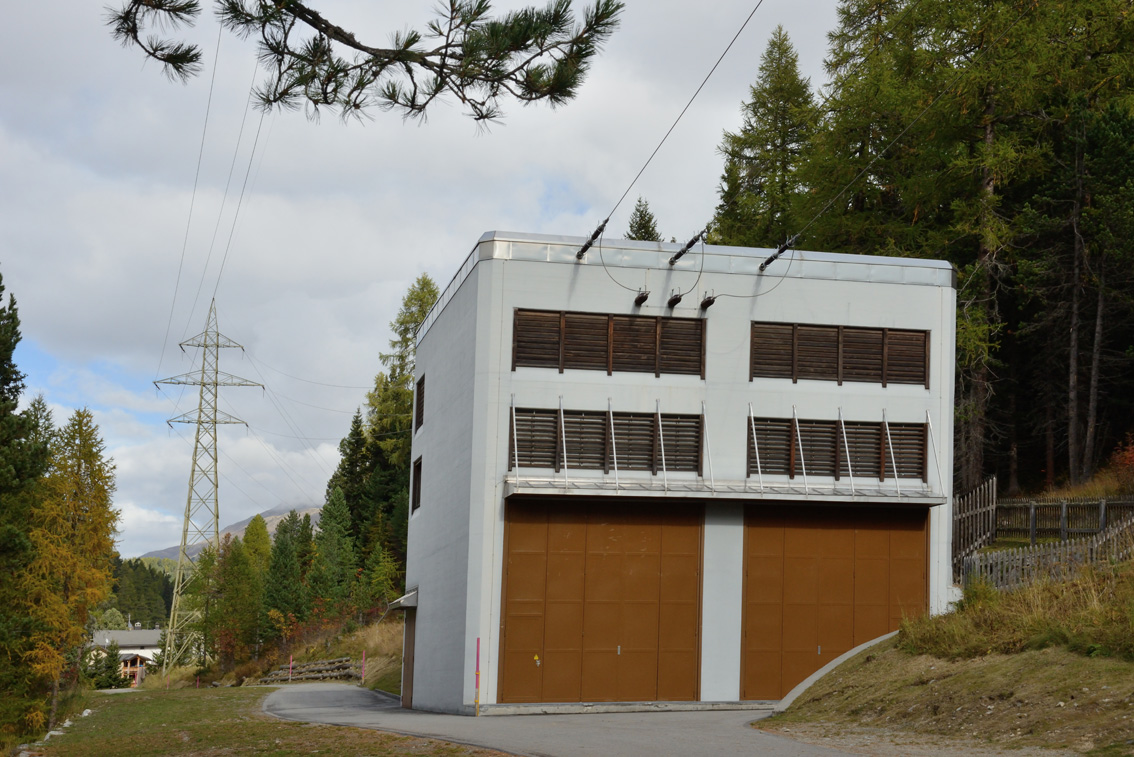 Das Unterwerk St. Moritz Bad (St. Moritz Energie) erhöht die Versorgungssicherheit und garantierte einen reibungslosen Ablauf der Alpinen Skiweltmeisterschaft 1974.